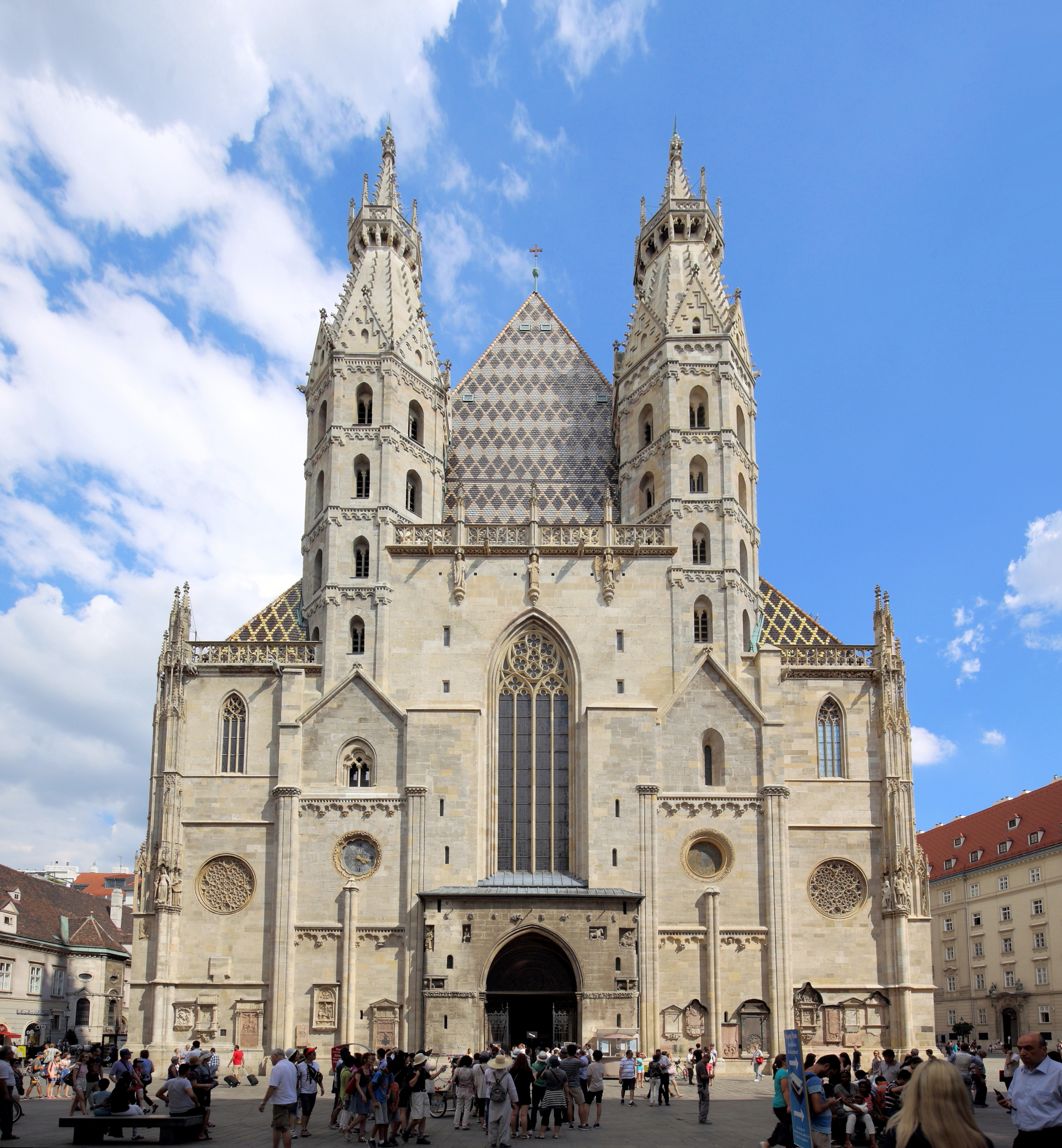 Nordwestansicht des Stephansdomes in der österreichischen Bundeshauptstadt Wien mit dem Hauptportal (romanischen Riesentor) und den beiden etwa 65 Meter hohen Heidentürmen.